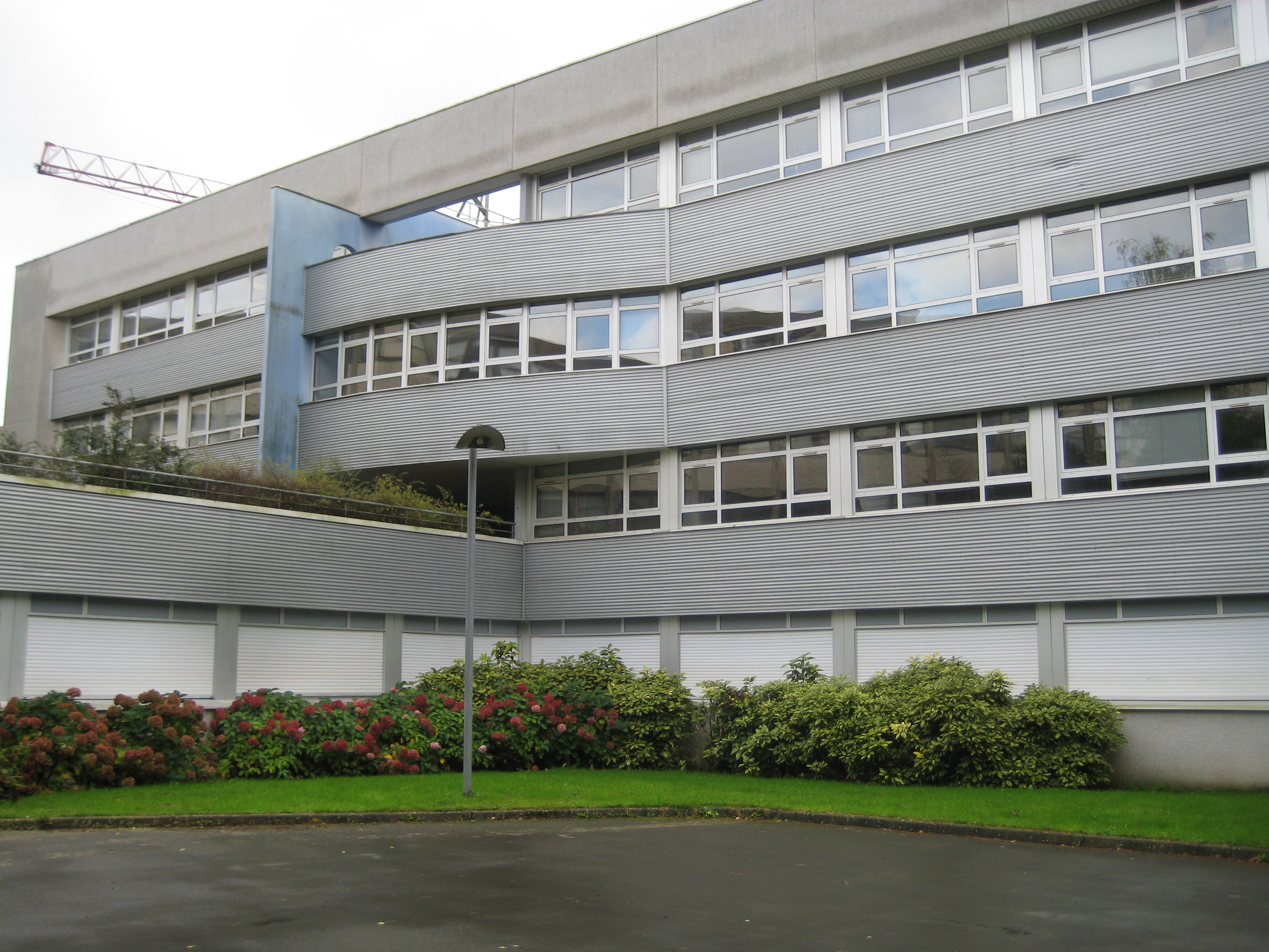 IRISA, centre de recherche en informatique de l'INRIA à Rennes